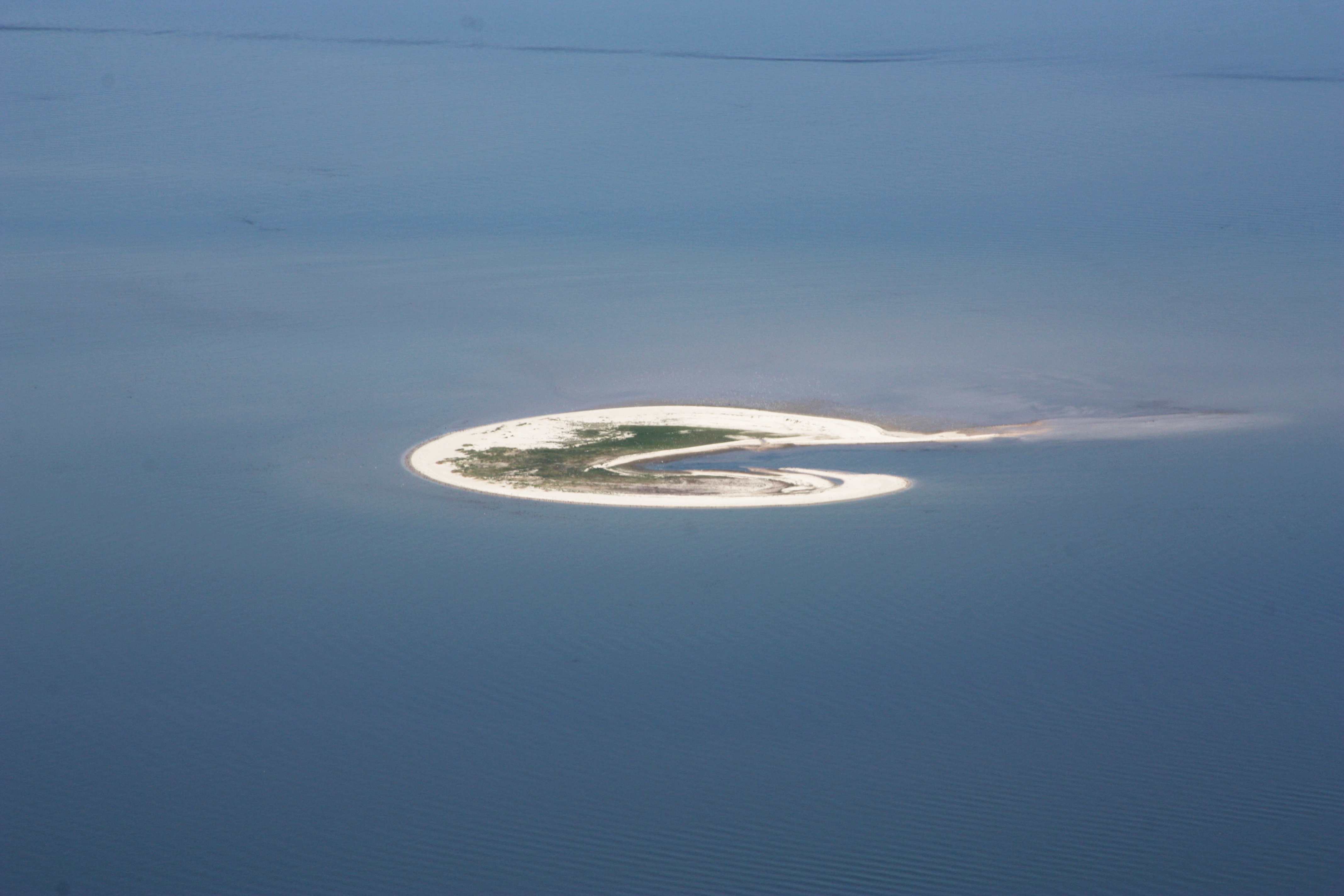 Flug Pilsumer Leuchtturm nach Borkum; Flughöhe 1500 ft; Juli 2010; Originalfoto nachbearbeitet: Tonwertkorrektur und Bild geschärft mit Hochpassfilter